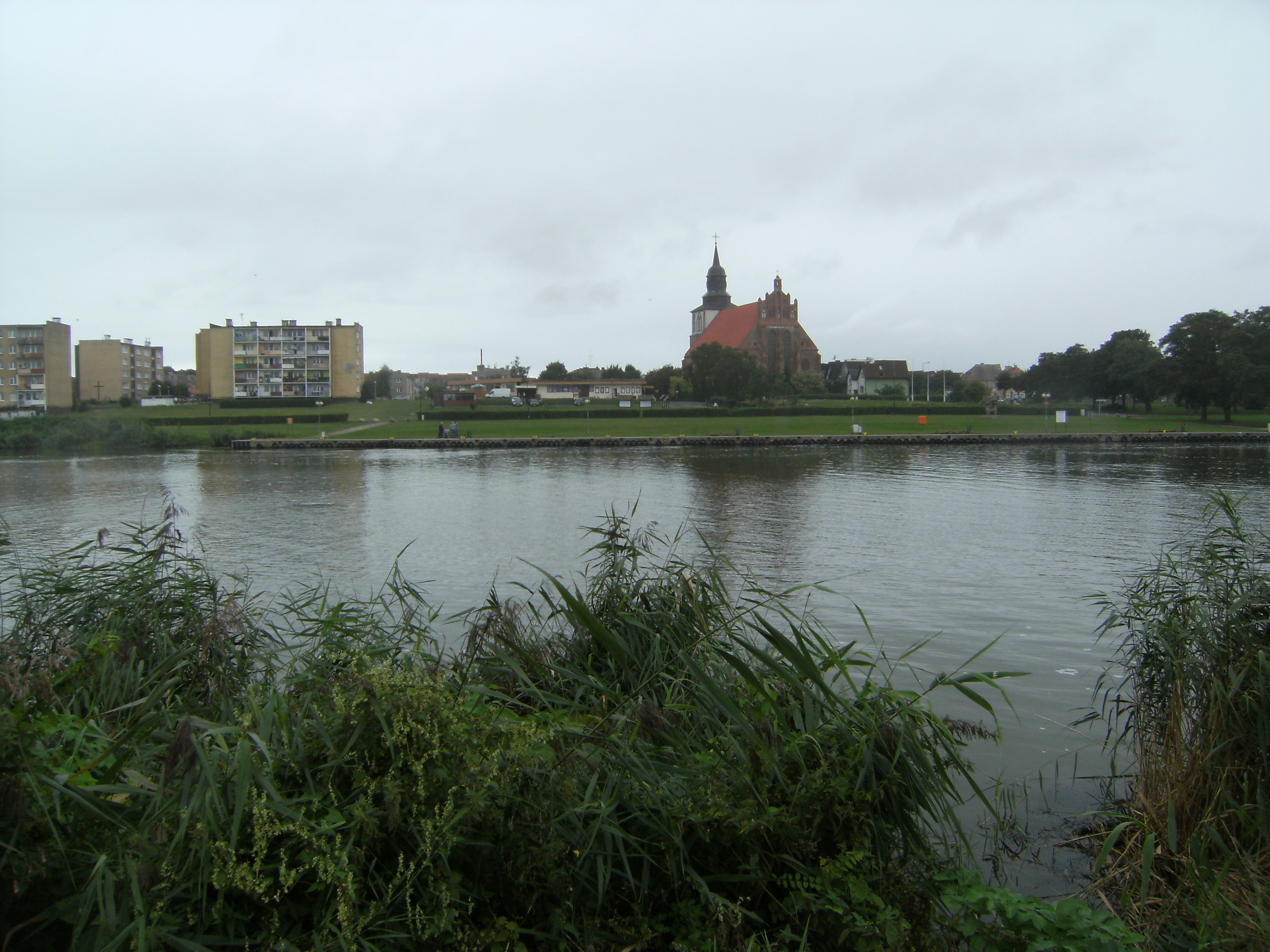 Blick auf die Stadt Wolin